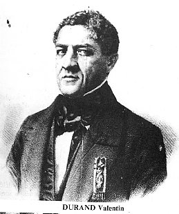 Barthélémy Durand Valantin, député du Sénégal.